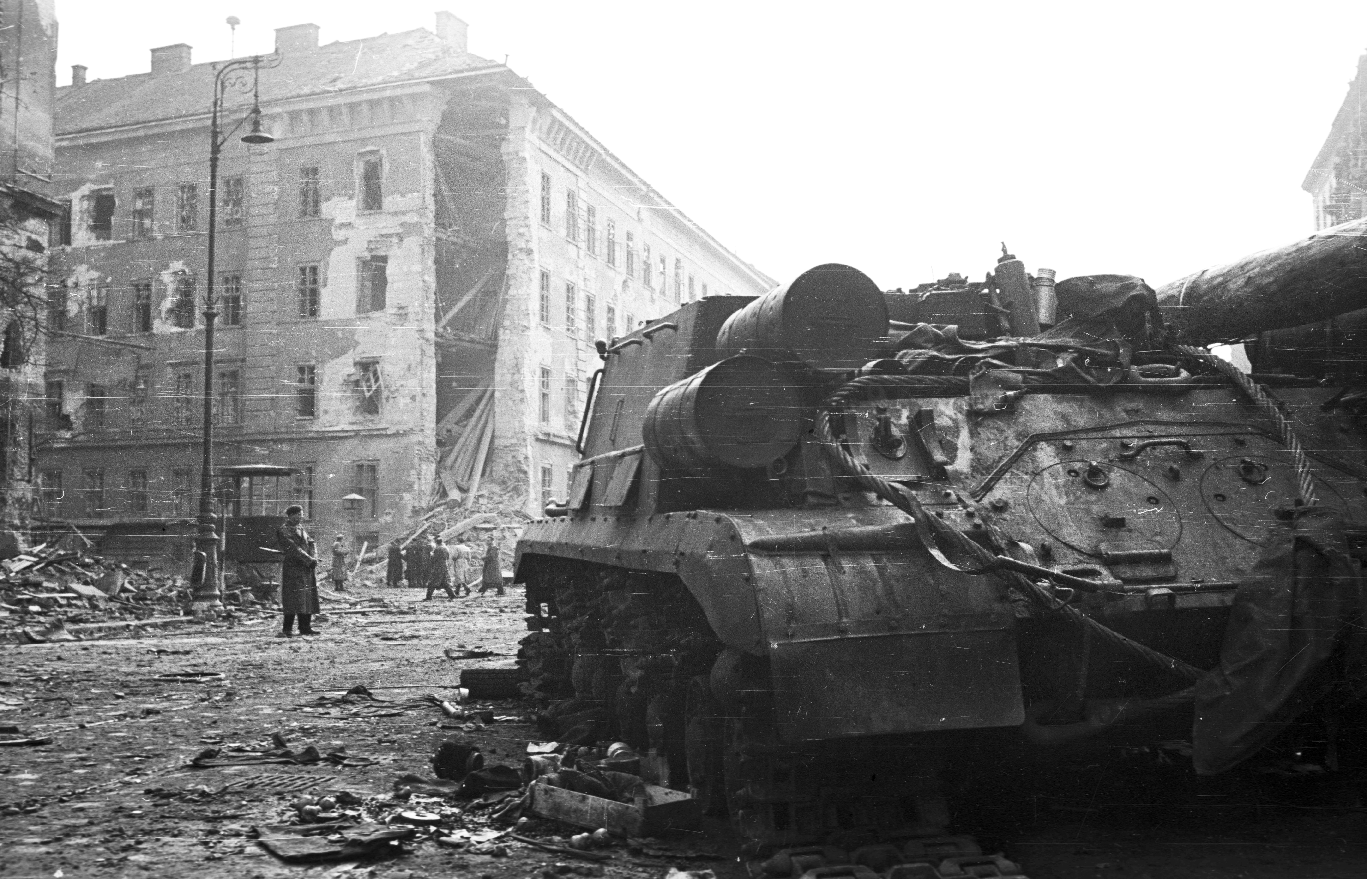 Üllői út - Ferenc körút sarok, a Kilián laktanya a József körútról nézve, előtérben egy kilőtt ISU-152-es rohamlöveg. Location: Hungary, Budapest IX. Tags: wreck, Soviet brand, revolution, ISU-152 assault gun, war damage, combat vehicle, Budapest Title: Üllői út - Ferenc körút sarok, a Kilián laktanya a József körútról nézve, előtérben egy kilőtt ISU-152-es rohamlöveg.